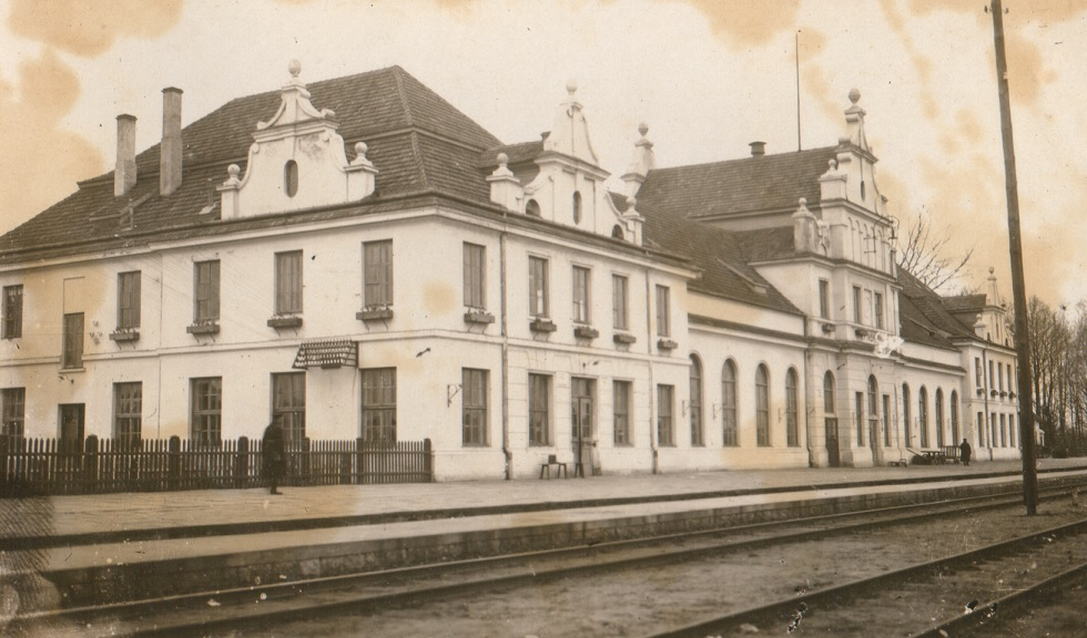 Беларуская (тарашкевіца): Пінск (Pinsk), вуліца Чыгуначная (vulica Čyhunačnaja). Чыгуначная станцыя